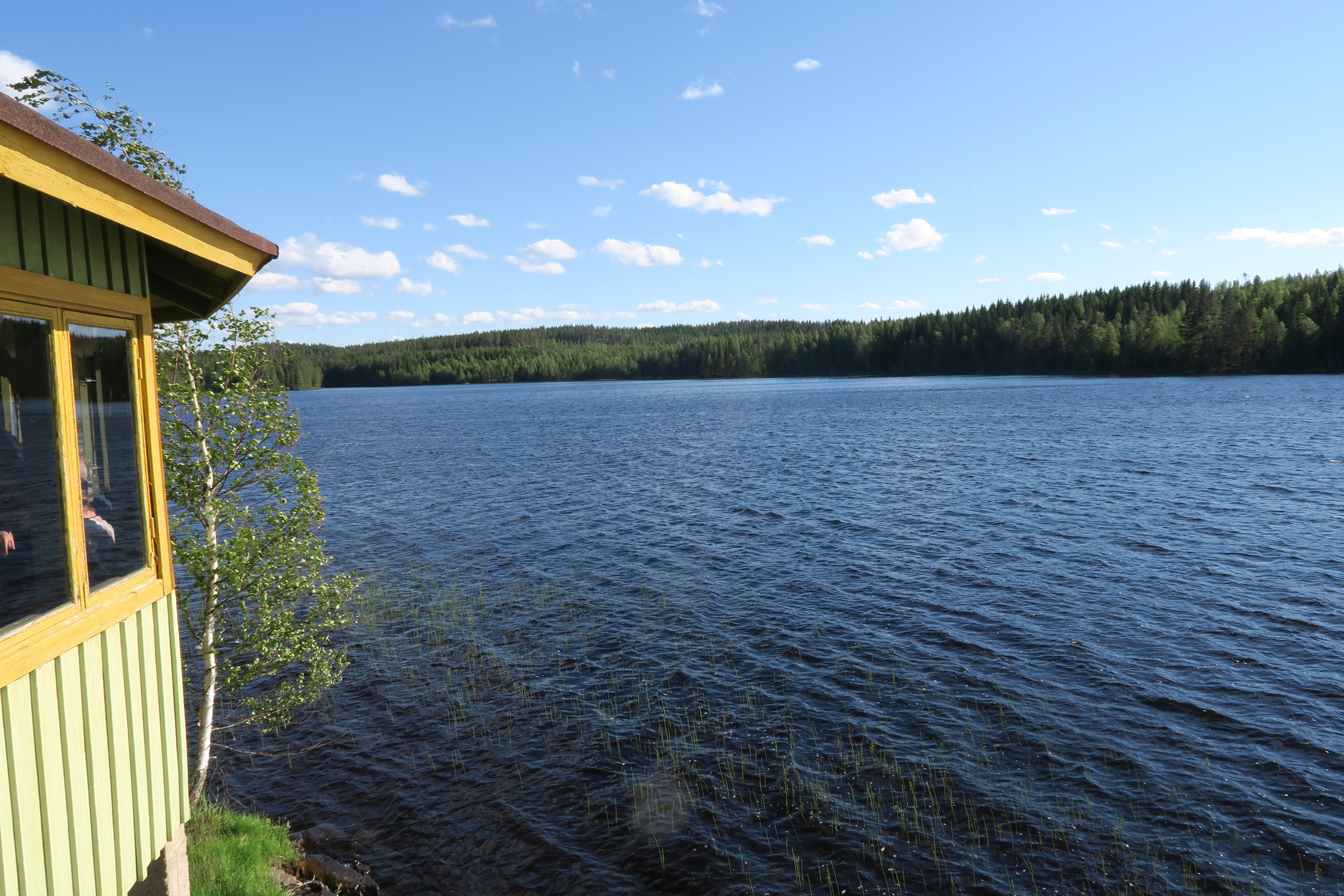 Näkymä vaskivedelle Myllyniemen lavan rannasta Virroilla